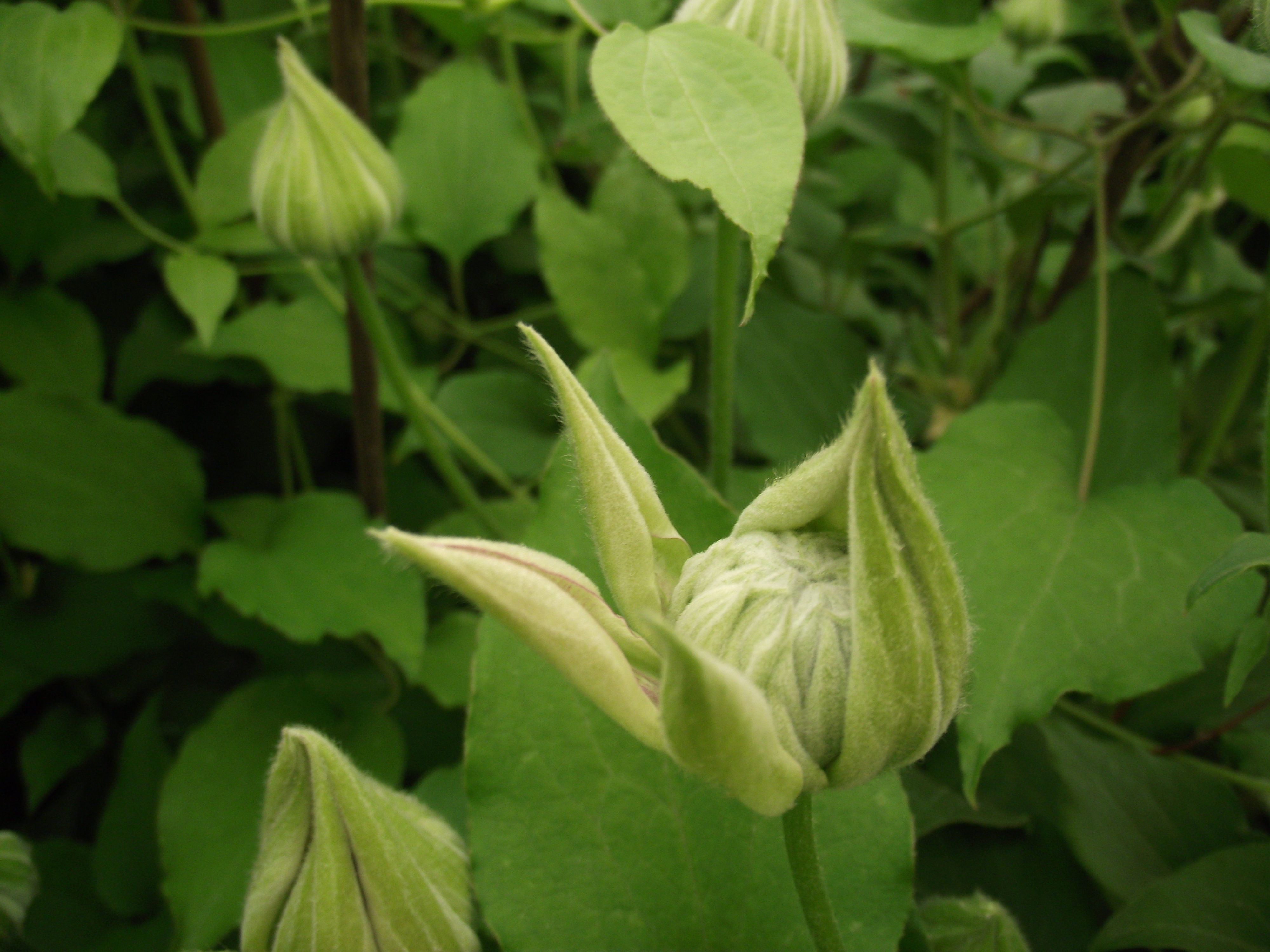 bouton florale de clématite diamantina evipo039